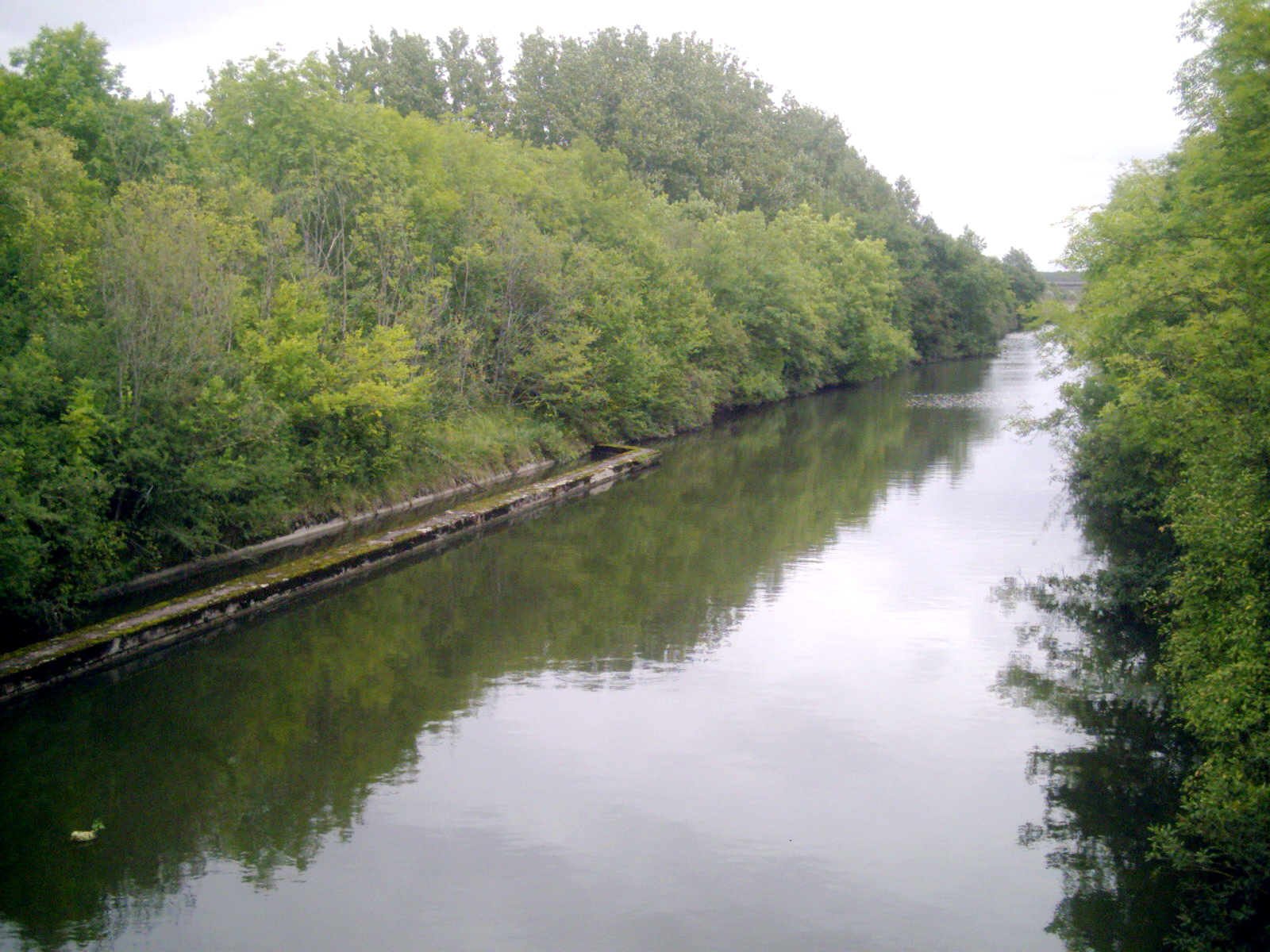 Villey-Saint-Étienne: ancien canal de la Marne au Rhin